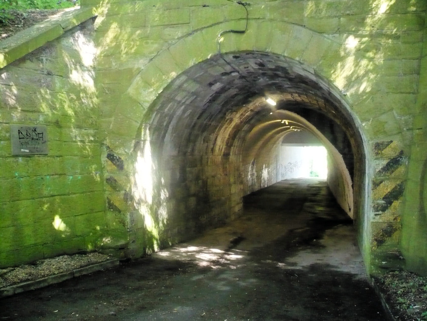 Tunnel Grunertstraße in Essen, auch ehem. Kriegsgefangenenlager